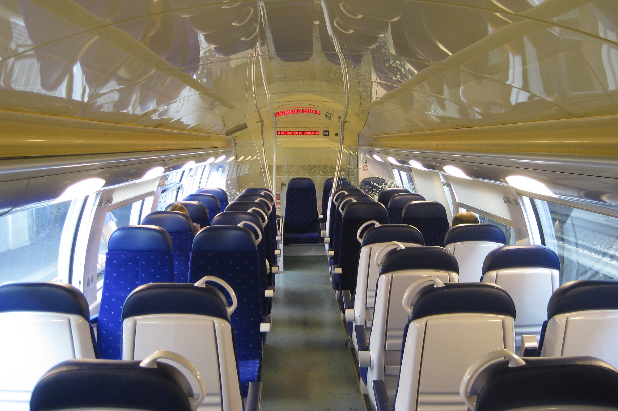 Intérieur du 1er étage d'une rame Z 24500 de la région des Pays de la Loire.